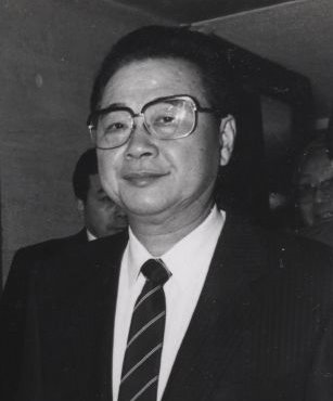 中华人民共和国前总理：李鹏